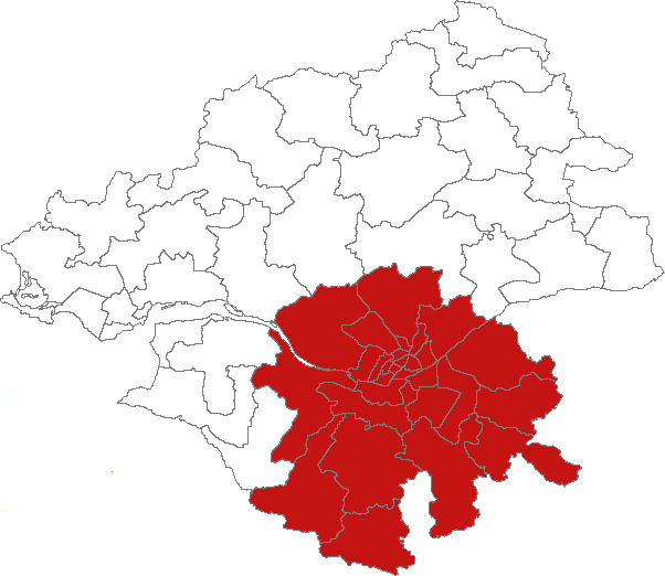 Carte de localisation de l'arrondissement de Nantes (France, Loire-Atlantique)